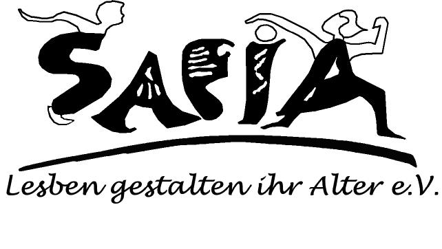 SAFIA e.V. - Lesben gestalten ihr Alter, Vereinssitz: Wiesbaden